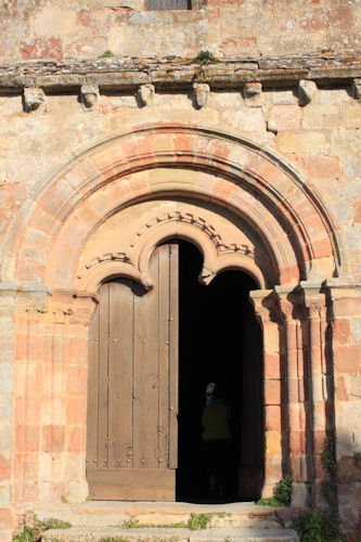 Marigny (03) Portail de l'église Saint Pourçain